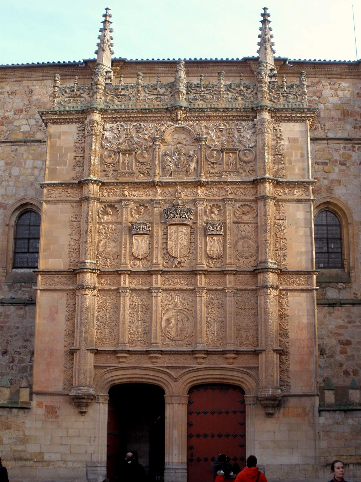 Escuelas Mayores de la Universidad de Salamanca